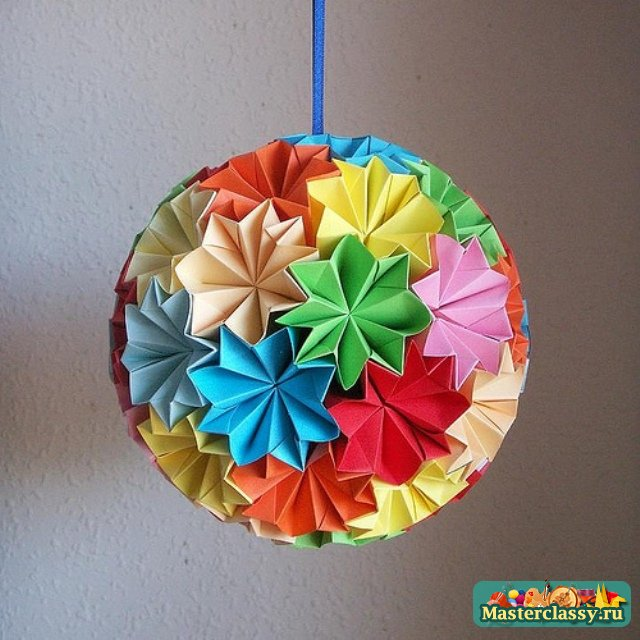 Օրիգամի